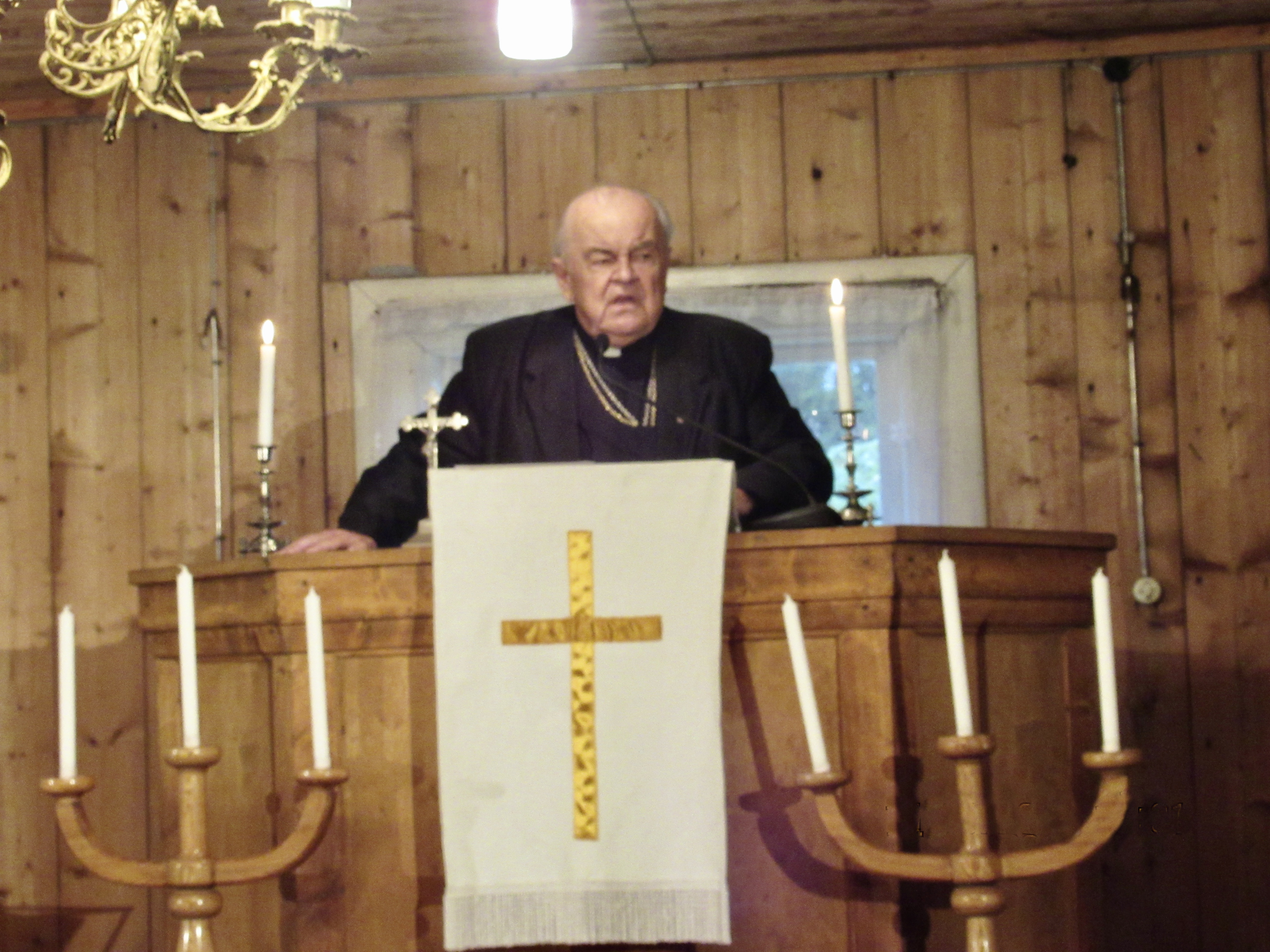 Eenok Haamer Hageri palvemajas